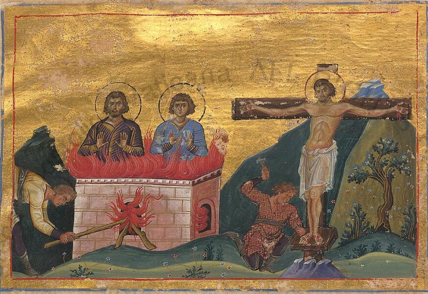 Порфирий, Иулиан, Феодул. Константинополь. 985 г. Миниатюра Минология Василия II. Ватиканская библиотека. Рим.